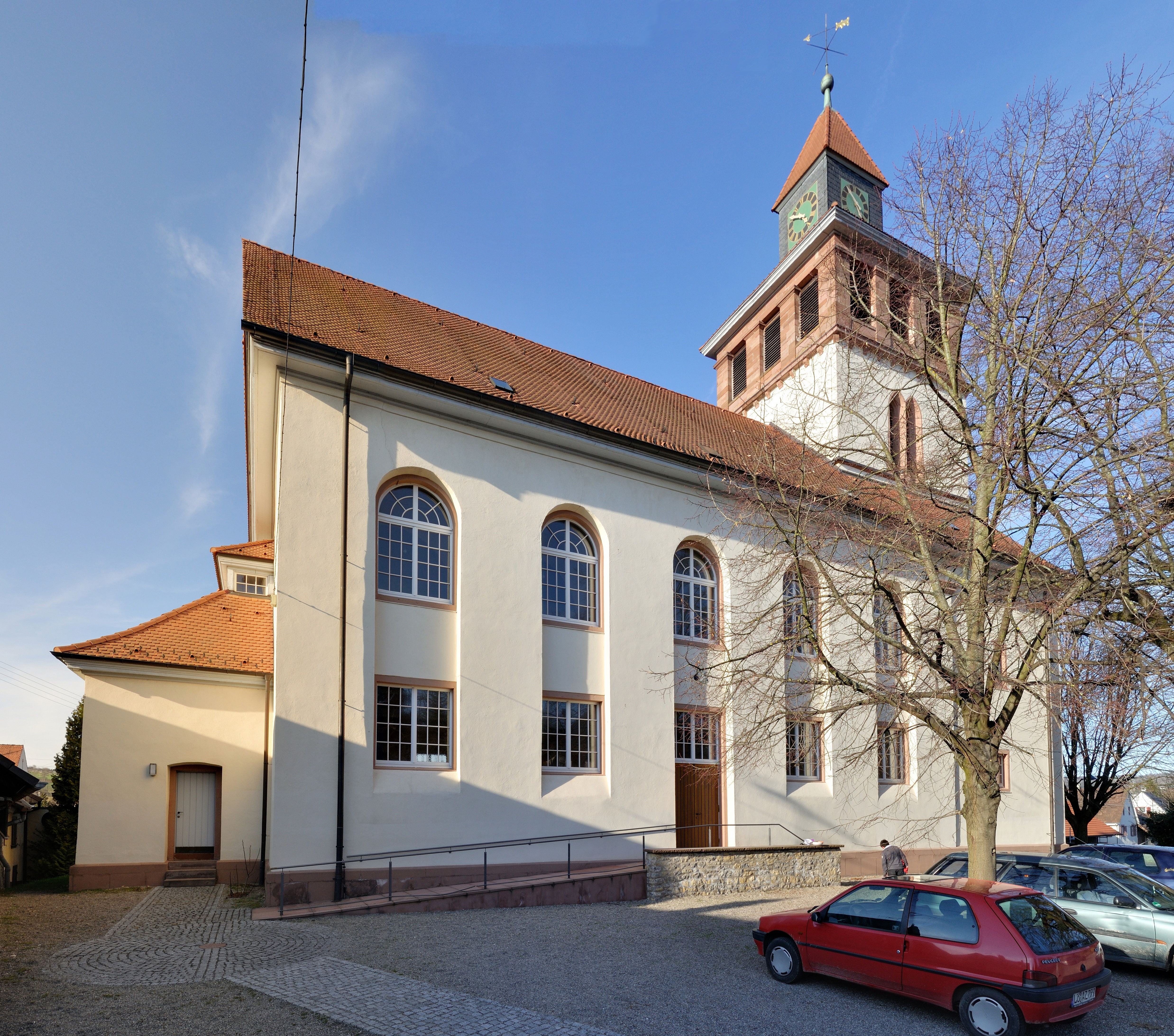 Binzen: Laurentiuskirche